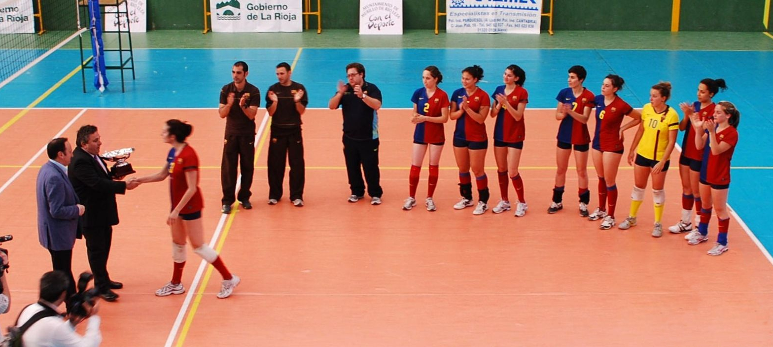 CVB Barça recogiendo el trofeo de campeón en la liga FEV.